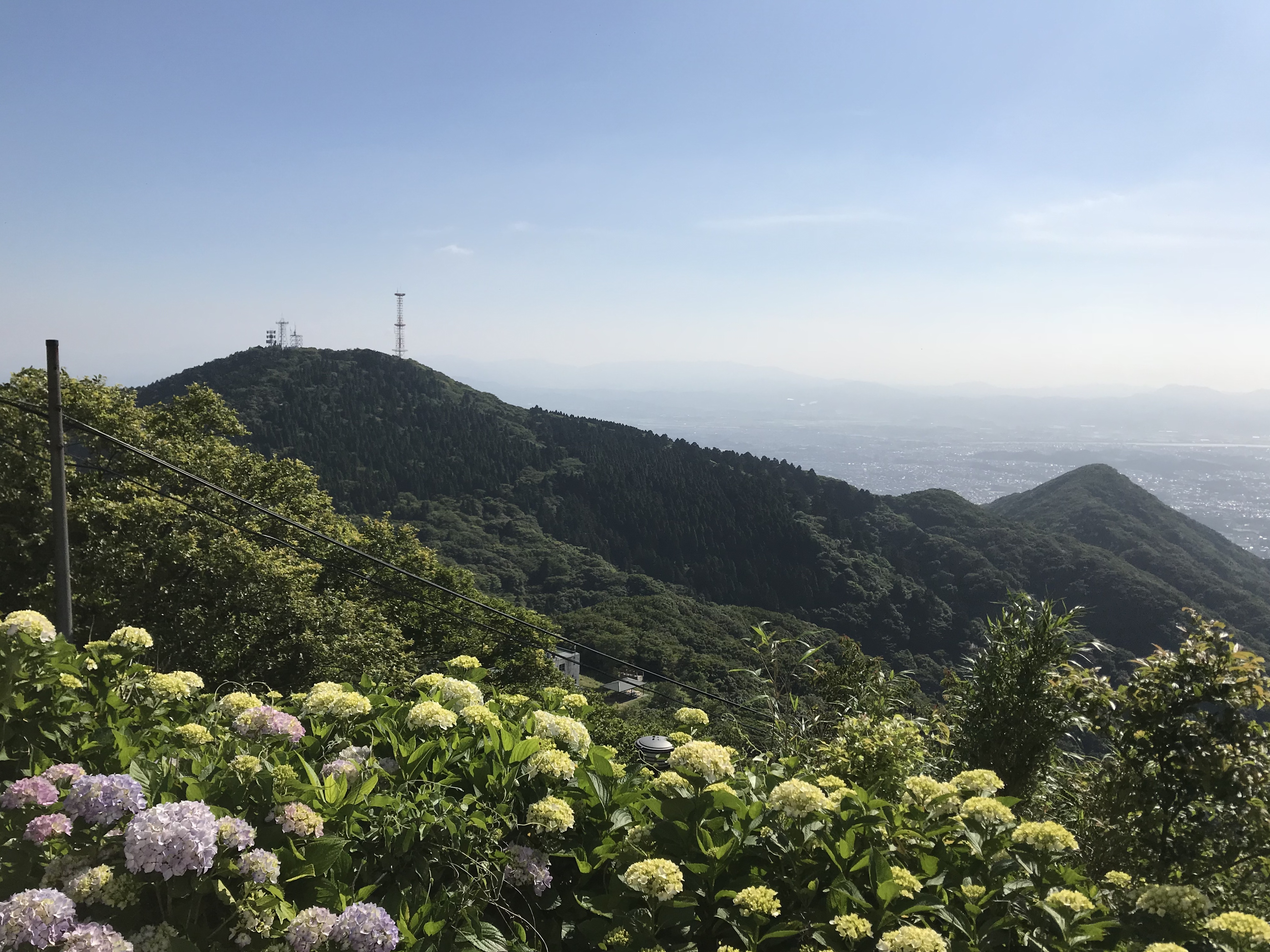 皿倉山山頂より望む権現山方面